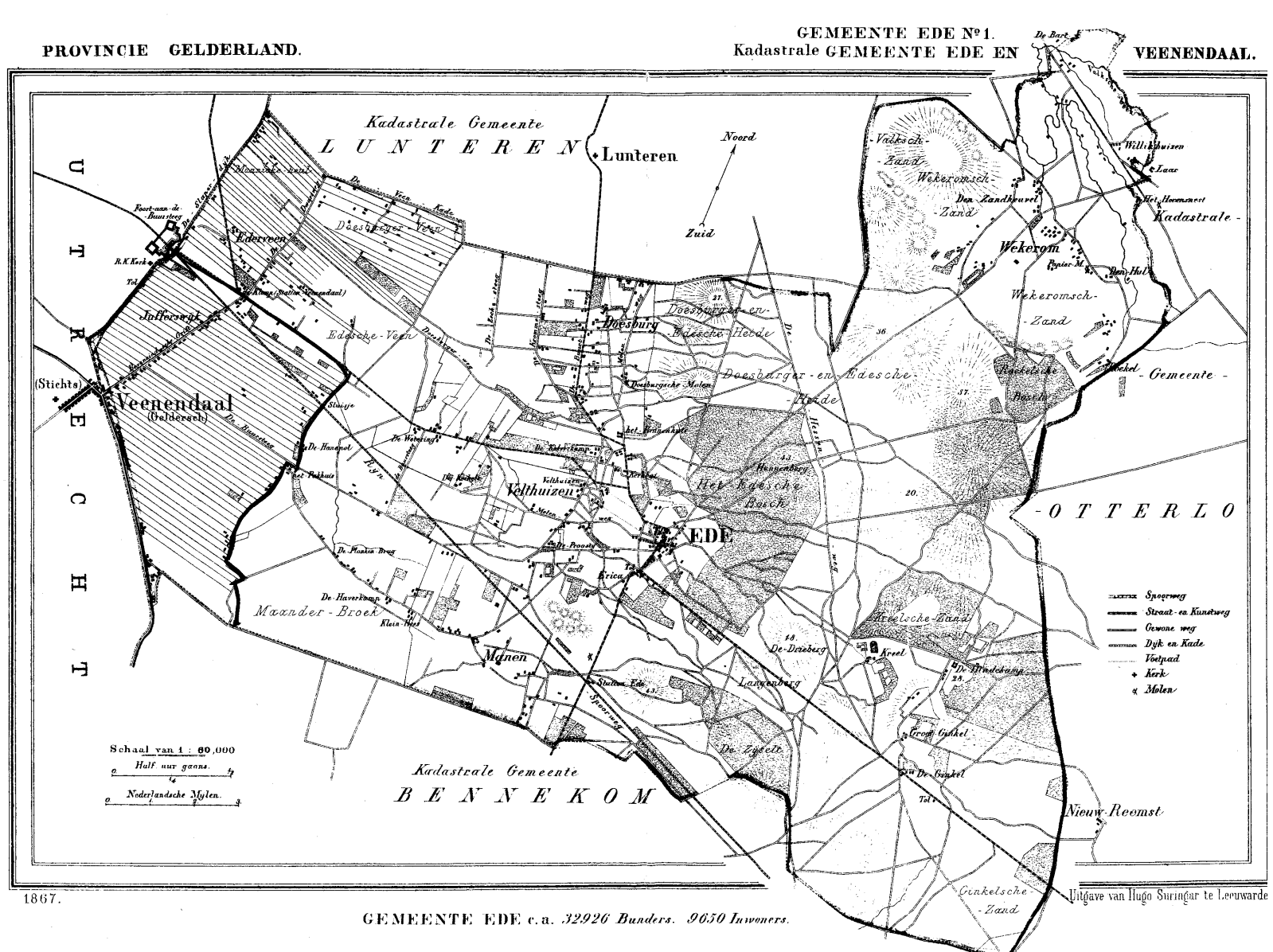 Kaart van een deel van de gemeente Ede in 1867. Wekerom in 1867 ten zuiden van het huidige Wekerom. Wekeromse Zand in 1867.